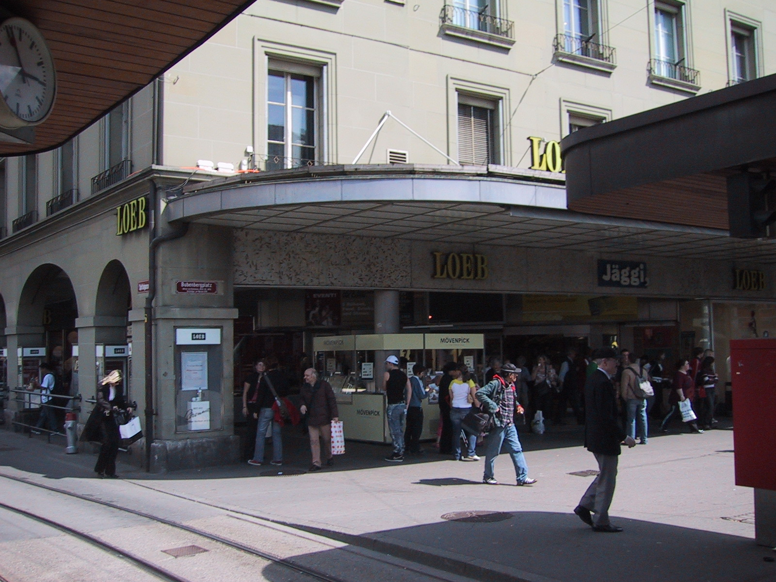 Loebegge, Vorplatz des Berner Warenhauses Loeb